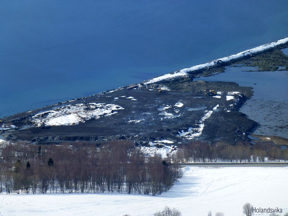 Arbeidet med utfylling av våtmarksområdet Drevjeleira, er påbegynt.